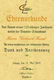 Ehrenurkunde des Deutschen Schachbundes, verliehen am 11. Mai 2002 zum Jubiläum des deutschen Schachbundes.